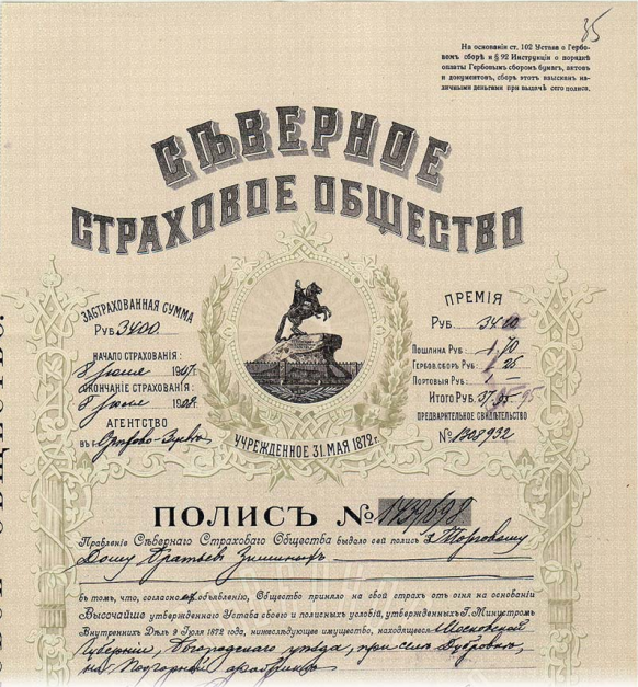 Страховой полис